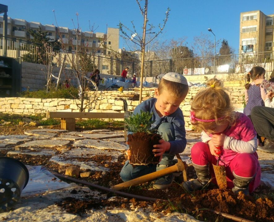 (2017) נטיעות בגינה הקהילתית בשכונת עיר גנים בירושלים, טו בשבט תשע"ז